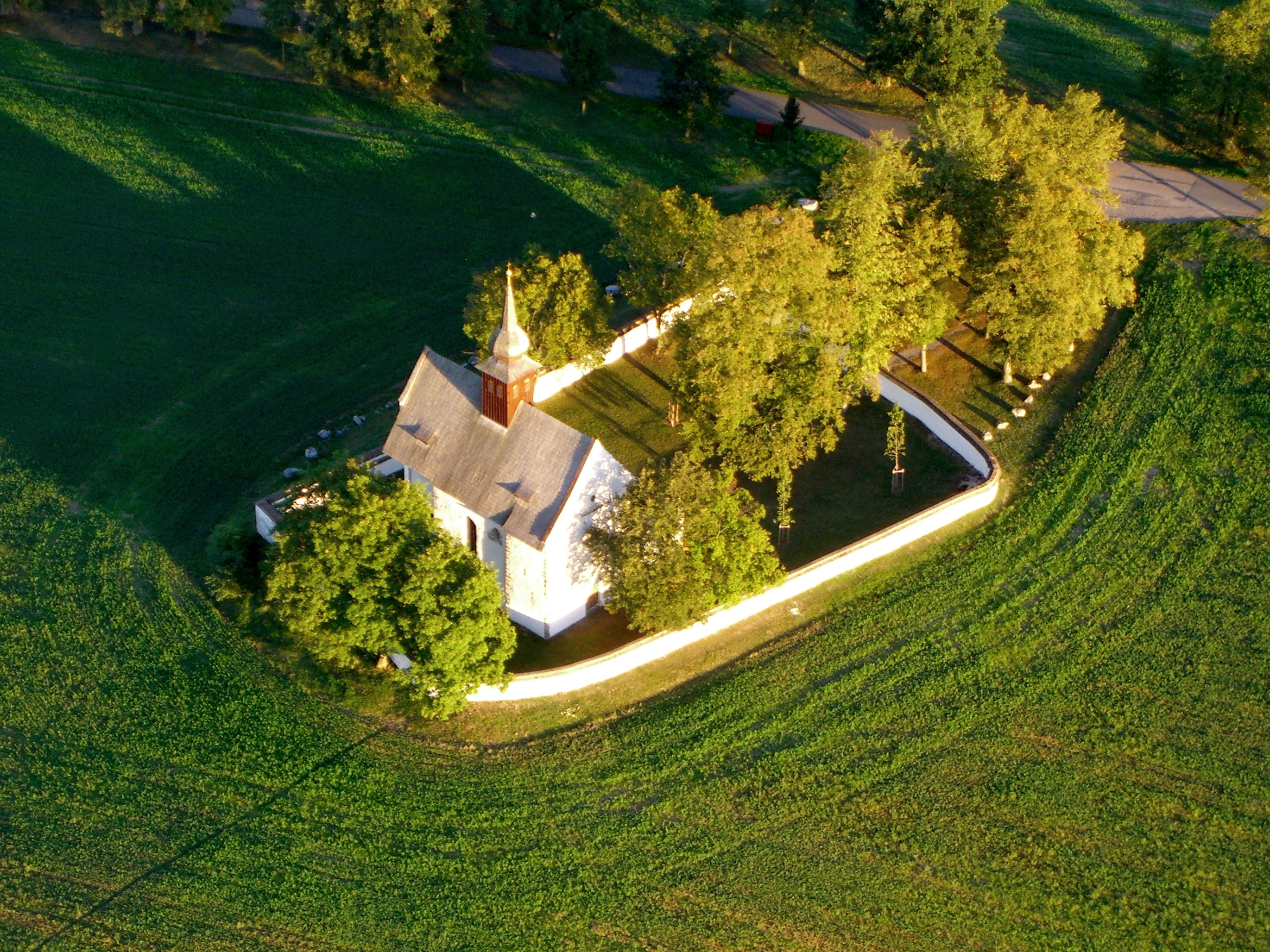 Letecký pohled na Kapli Matky Boží Veverské